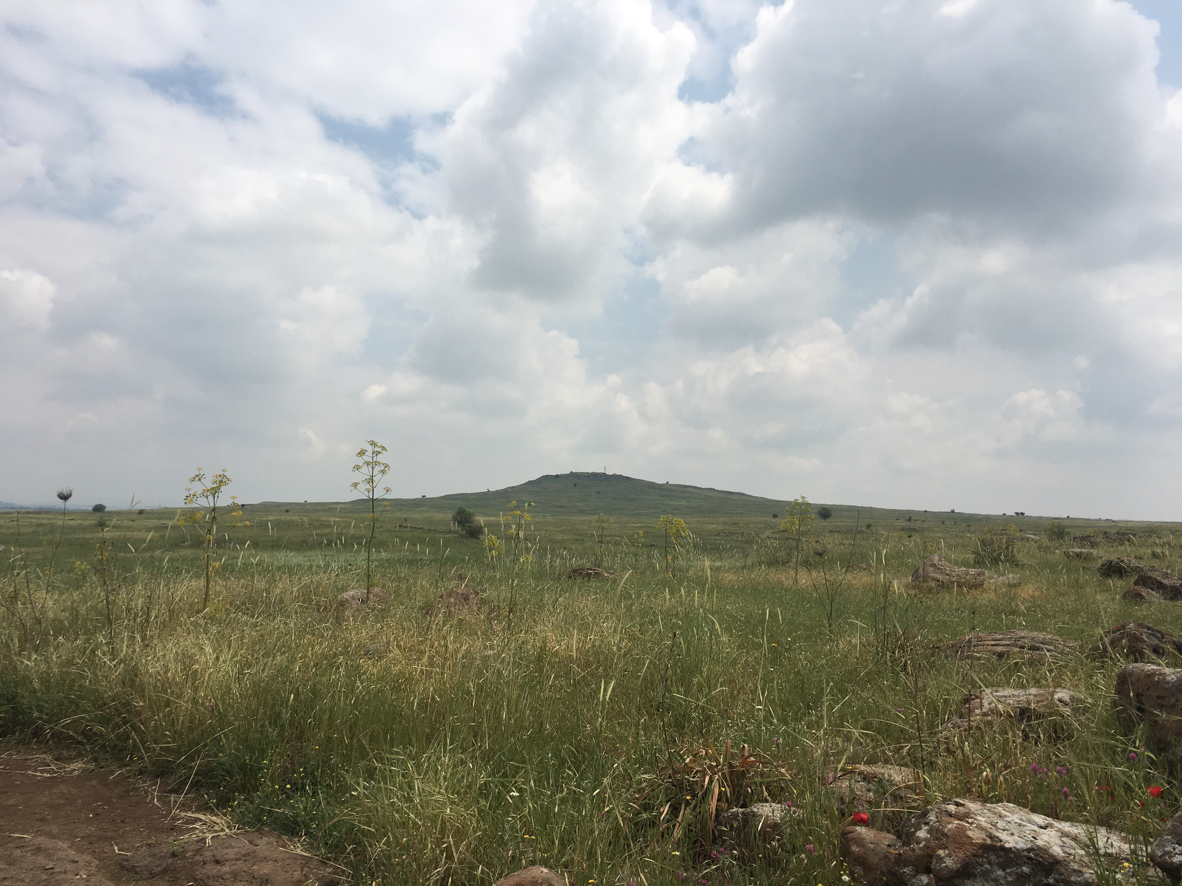 גבעת בזק - תל געש בגולן, כ-2 ק"מ מצפון-מזרח לאתר גמלא. שמו הערבי הוא תל בזאק. לרגלי הגבעה משתרע שדה דולמנים ובו כ-200 דולמנים